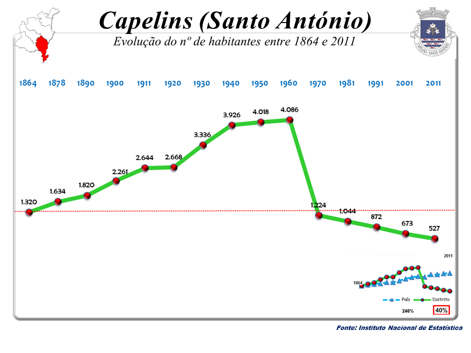 Censos 1864/2011